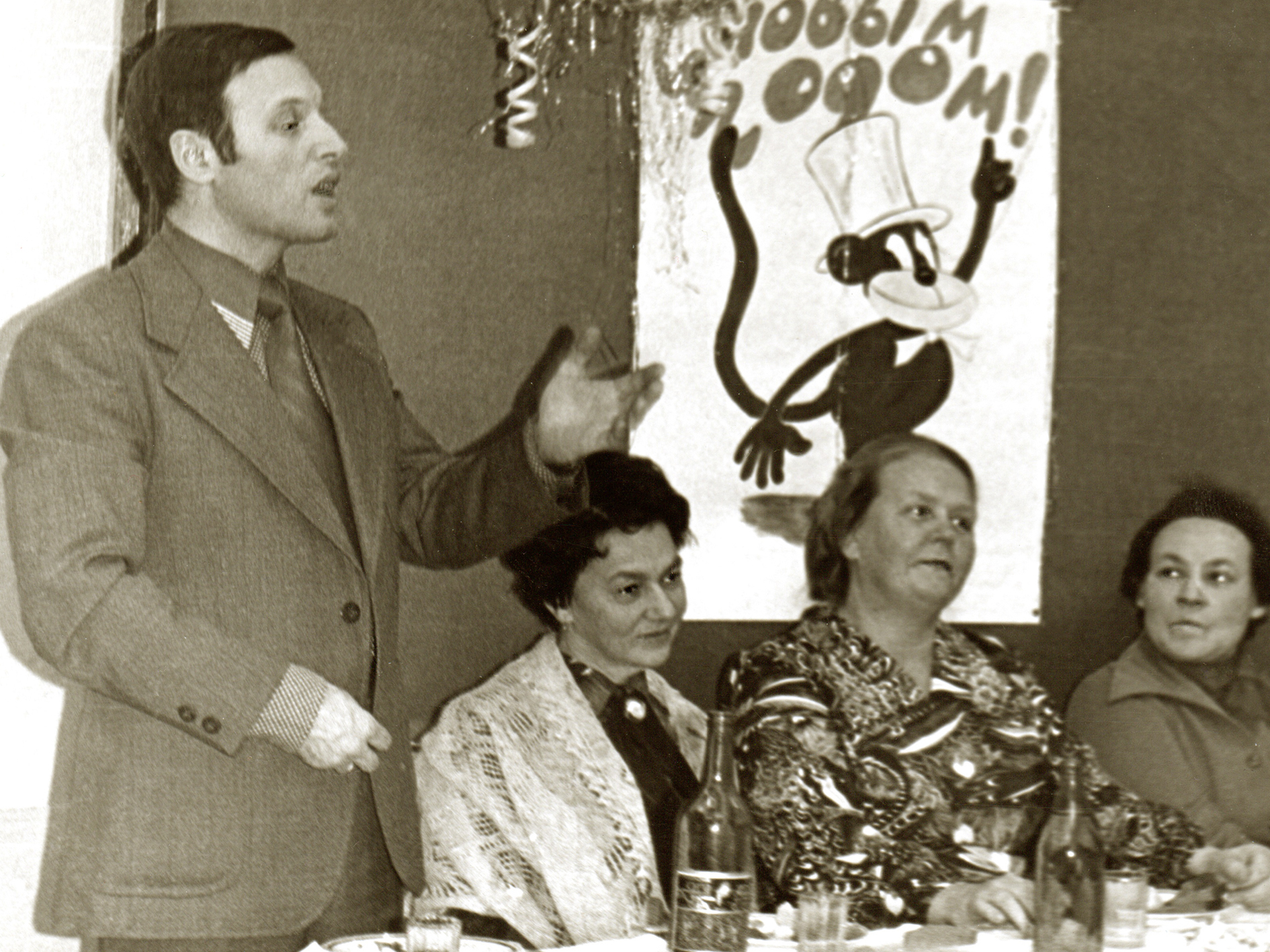 Кафедра фармакологии ЛПМИ. Между профессором Вильямом Анатольевичем Гуселем и заведующей кафедрой профессором Ириной Валерьевной Марковой сидит дочь академика АМН СССР В. М. Карасика Татьяна Владимировна Кольцова